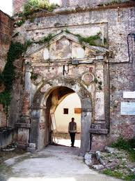 Fort Moussa, dit fort Barral, (Classé, 1930)